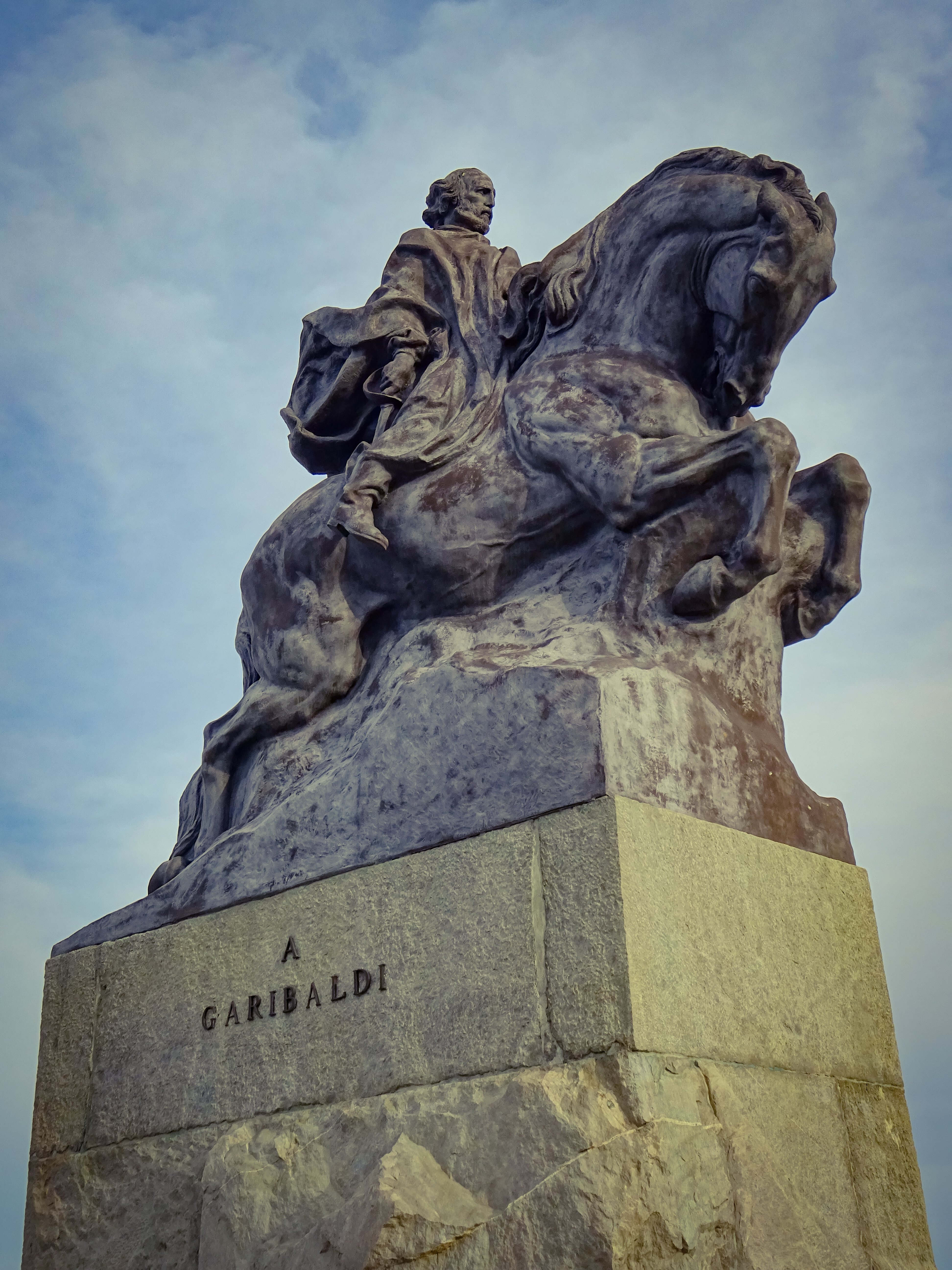 All’interno del parco pubblico Dante Alighieri si trova il Piazzale Eroe dei Due Mondi con la scultura raffigurante Giuseppe Garibaldi. Il grande monumento equestre è opera dello scultore Leonardo Bistolfi. La statua è stata posizionata in modo che lo sguardo di Garibaldi sia rivolto verso sua città natale, Nizza, ed è stata inaugurata nel 1927 dal nipote del grande condottiero. Questa posizione è una particolarità perchè la quasi totalità delle statue raffiguranti Garibaldi ho lo sguardo puntato verso la città di Roma, alla cui liberazione il condottiero ha dedicato la sua vita. This is a photo of a monument which is part of cultural heritage of Italy.